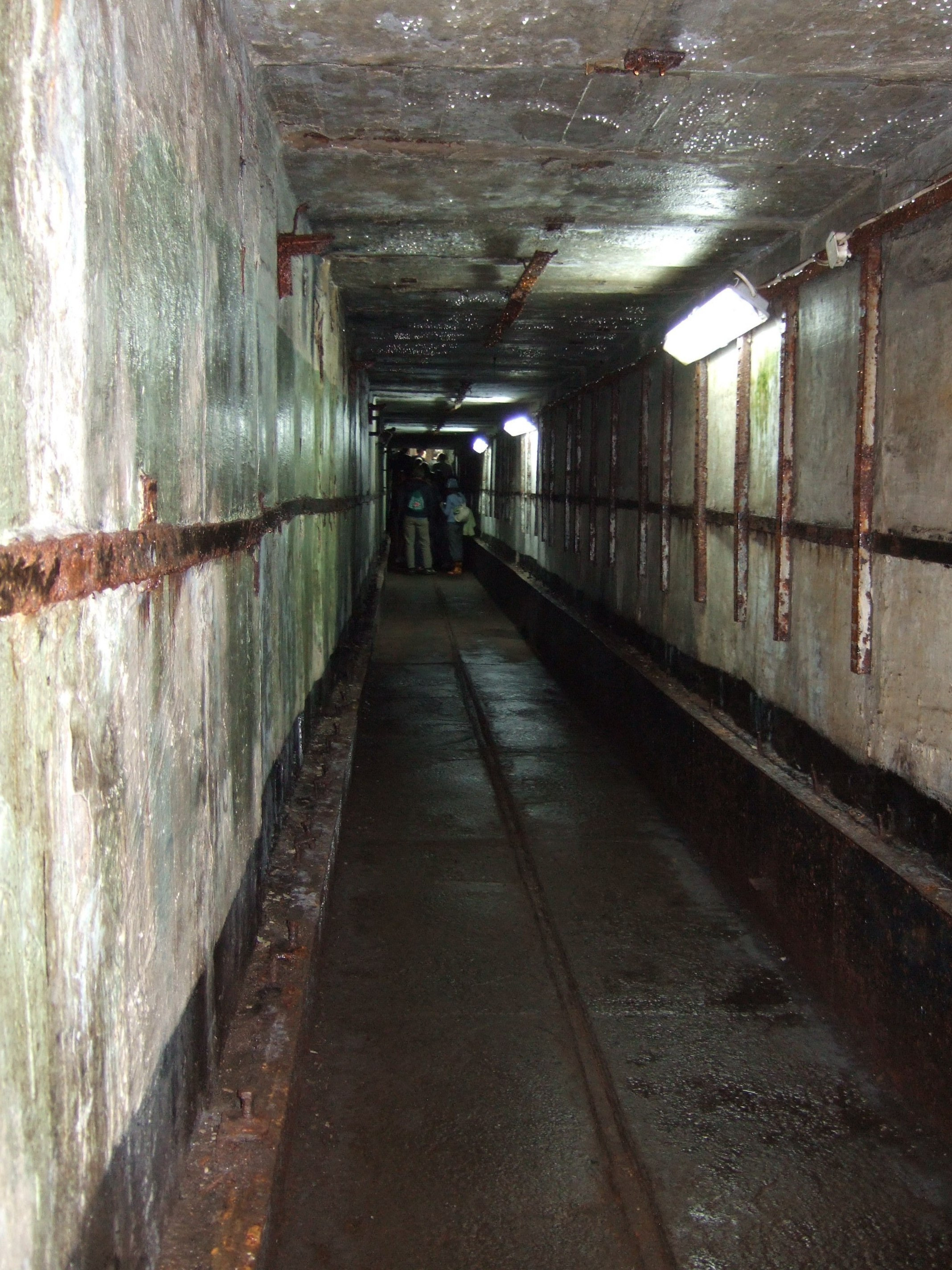 Plokštinės raketų bazė iki muziejaus rekonstrukcijos